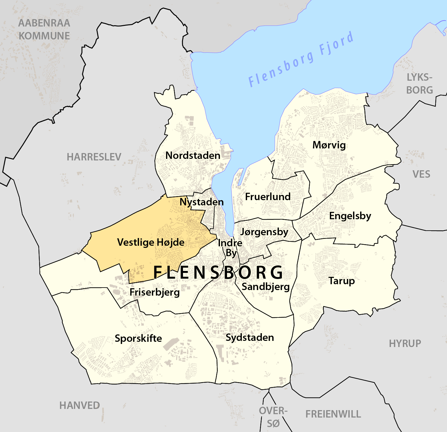 Beliggendhed af Vestlige Høje i Flensborg Kommune